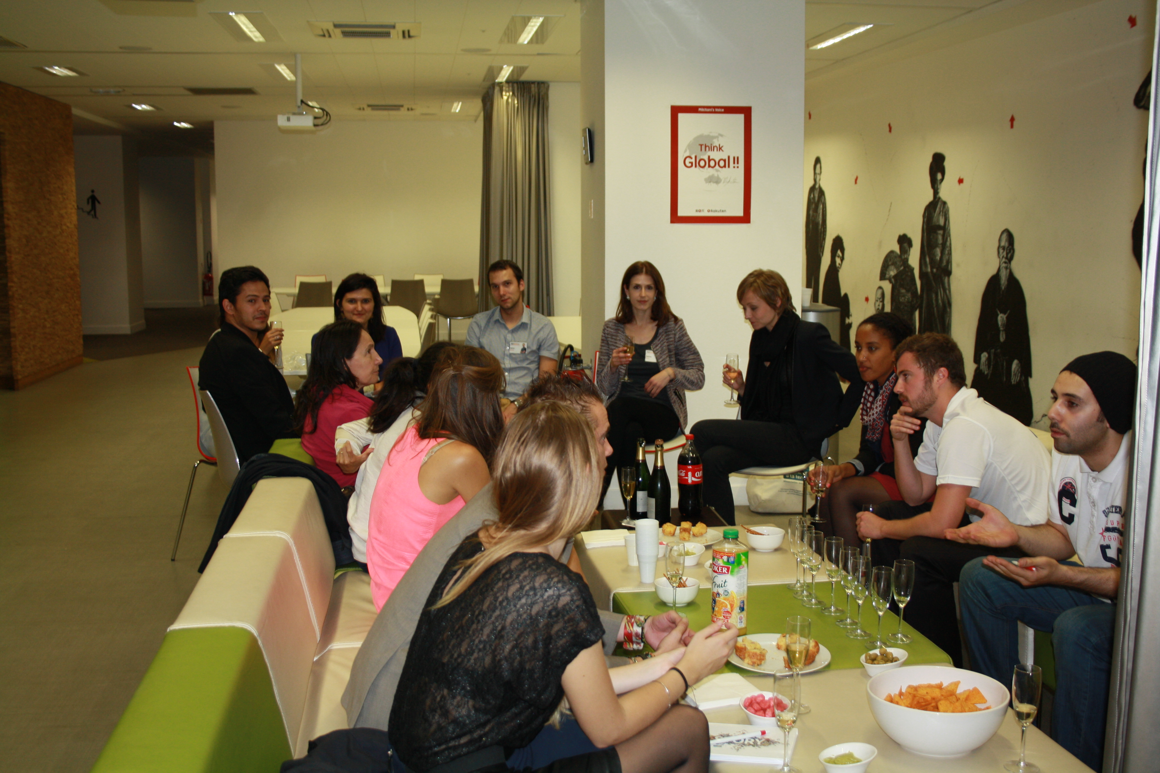 Apéro avec les marchands PriceMinister-Rakuten